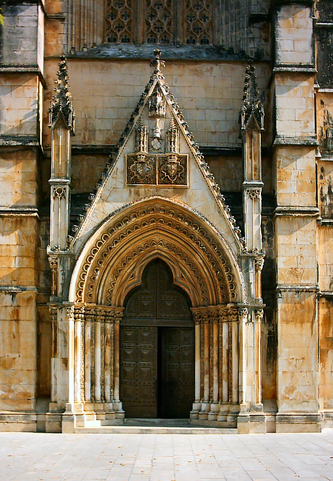 Mosteiro da Batalha, Portugal